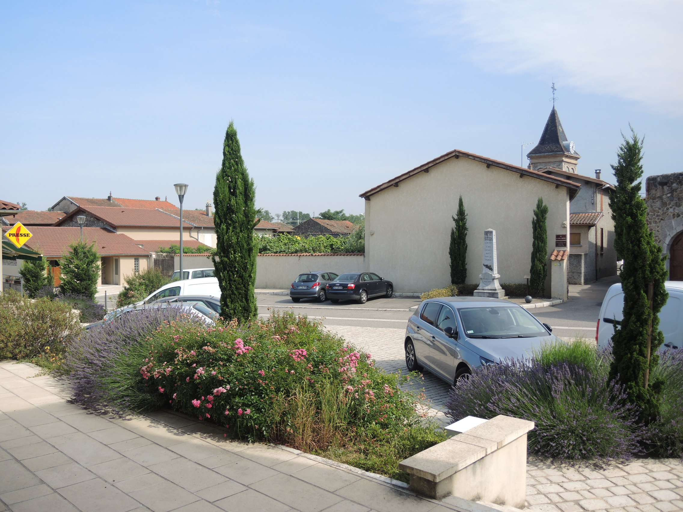 Limony détail